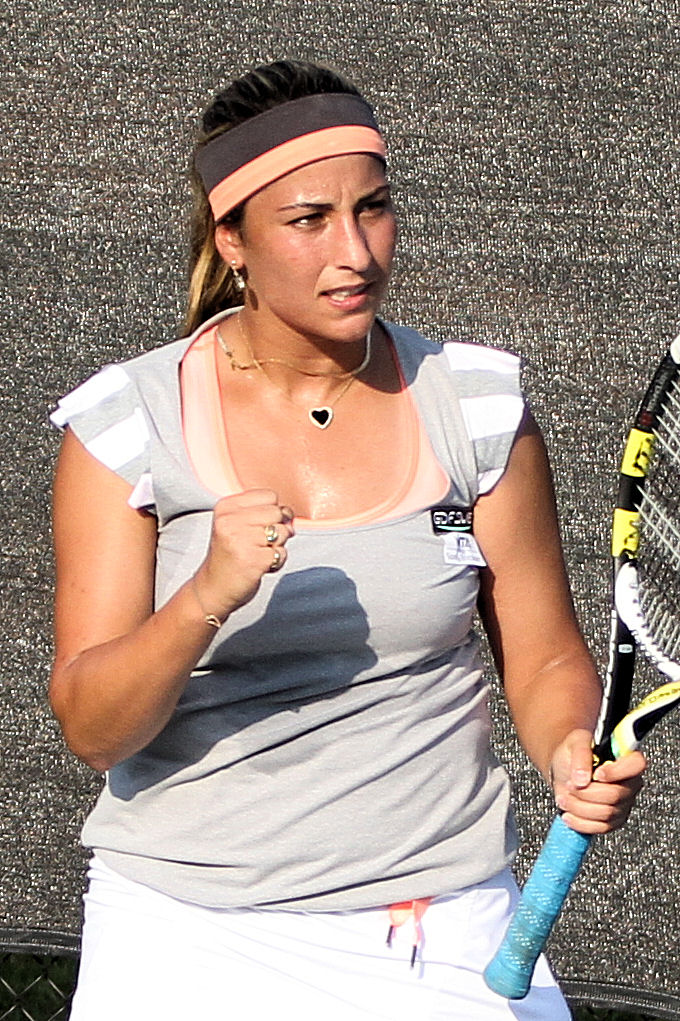 Aravane Rezai (FRA)